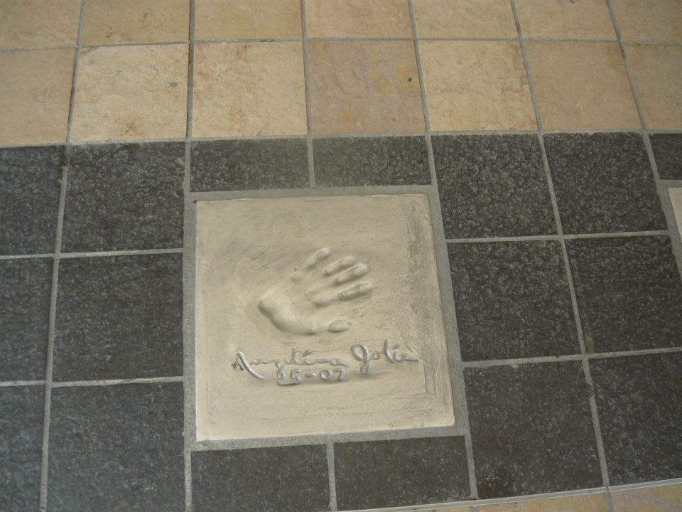 Otisk dlaně Angelina Jolie v Cannes